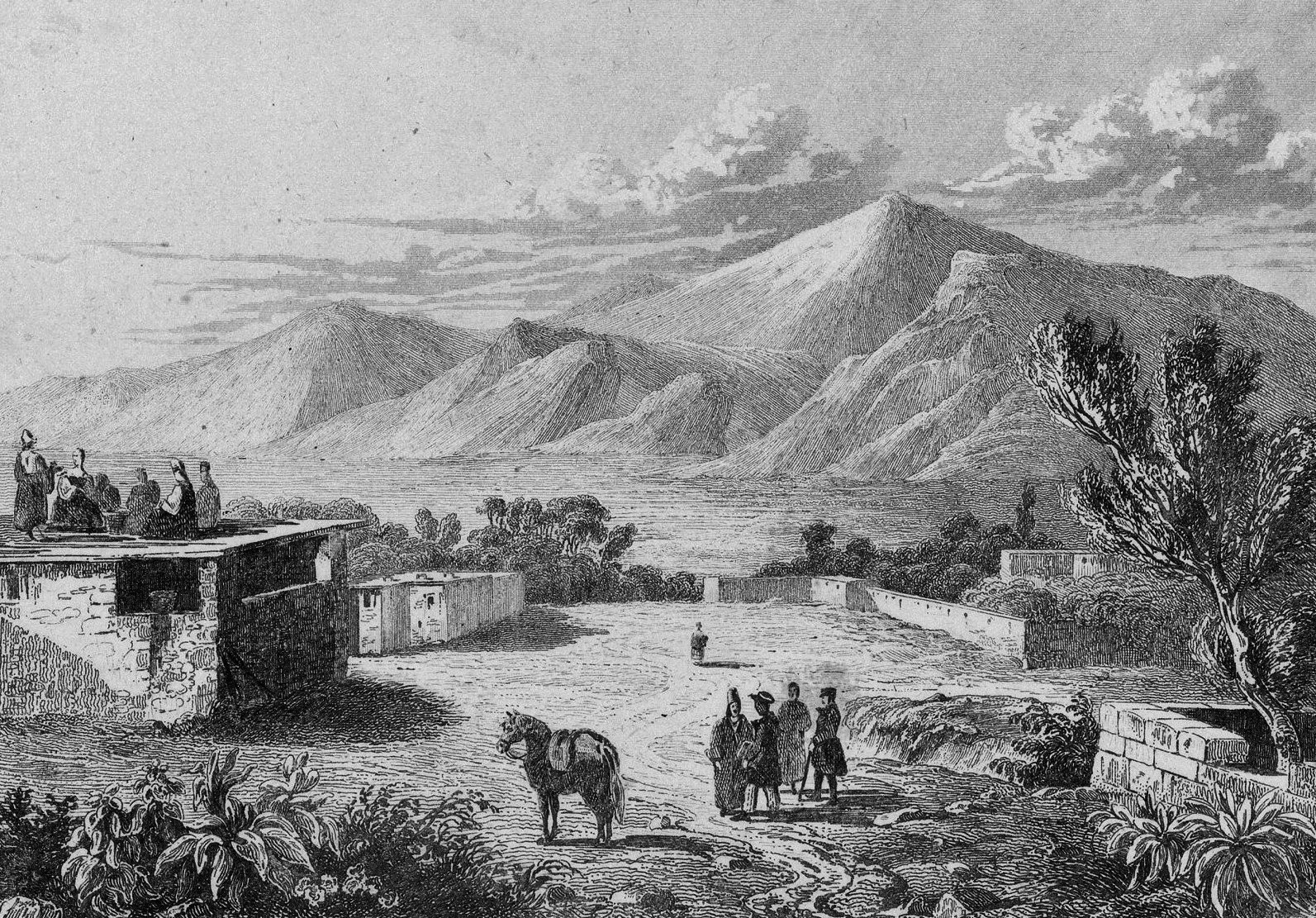 Vue du petit et du grand Ararat prise du Village Tatare, Sirbaghan